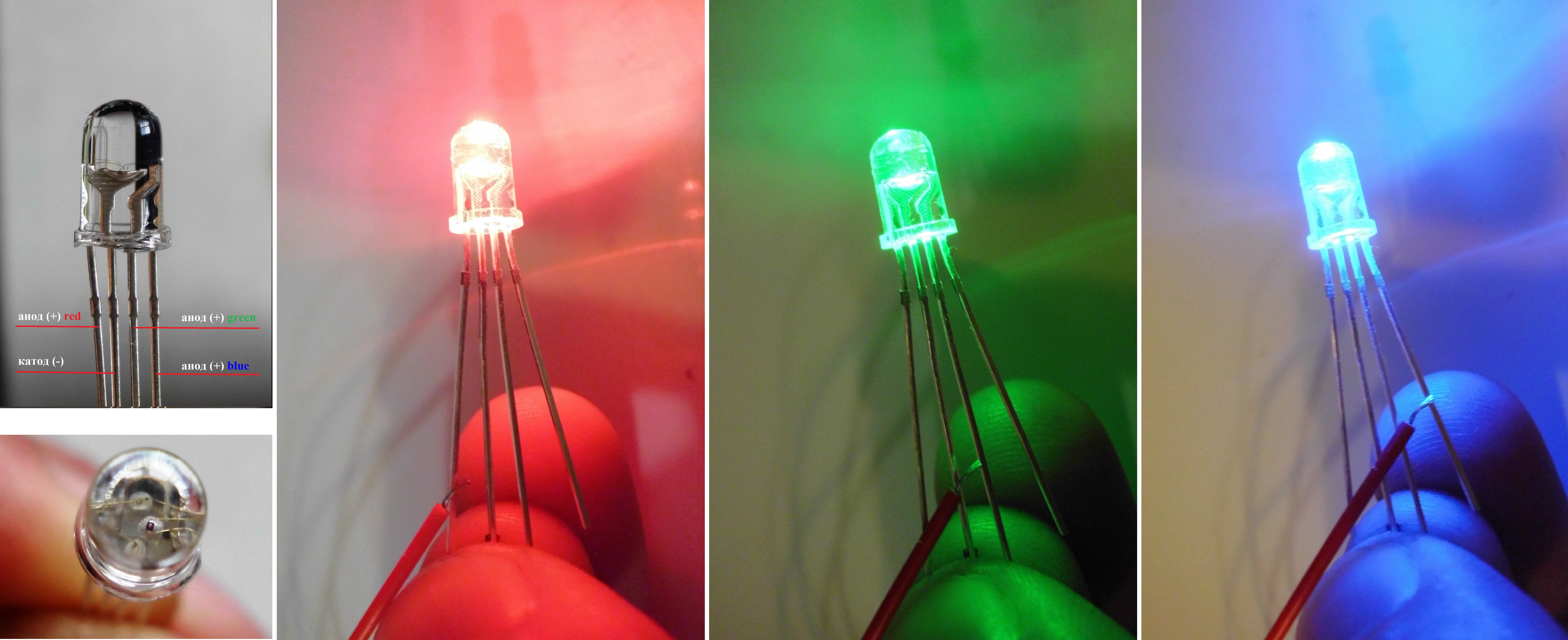 RGB-светодиод четырёхконтактный. 1 вывод (второй слева) - катод ("-"), остальные 3 вывода - аноды ("-") светодиодных чипов полупроводниковых переходов (красного, зелёного, синего свечения). Слева снизу вид сверху крупным планом. Питание током постоянного напряжения 3 В.